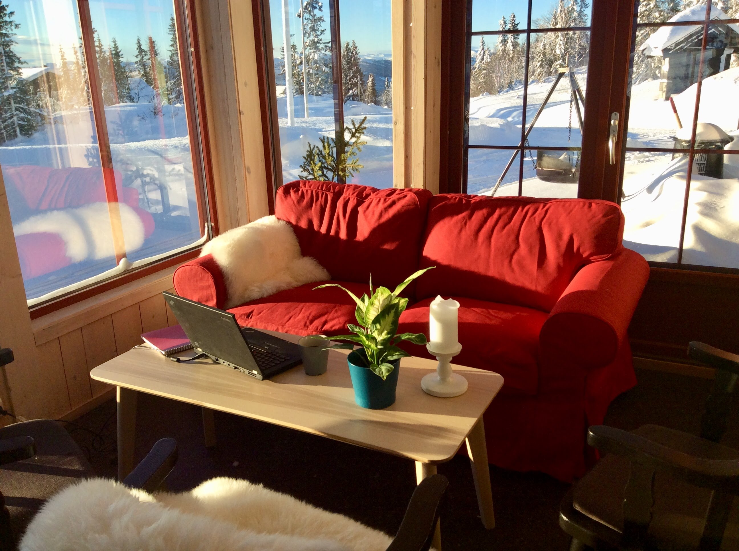 Tempelseter har god wifi dekning og brukes flittig som kontor av hyttefolket og besøkende